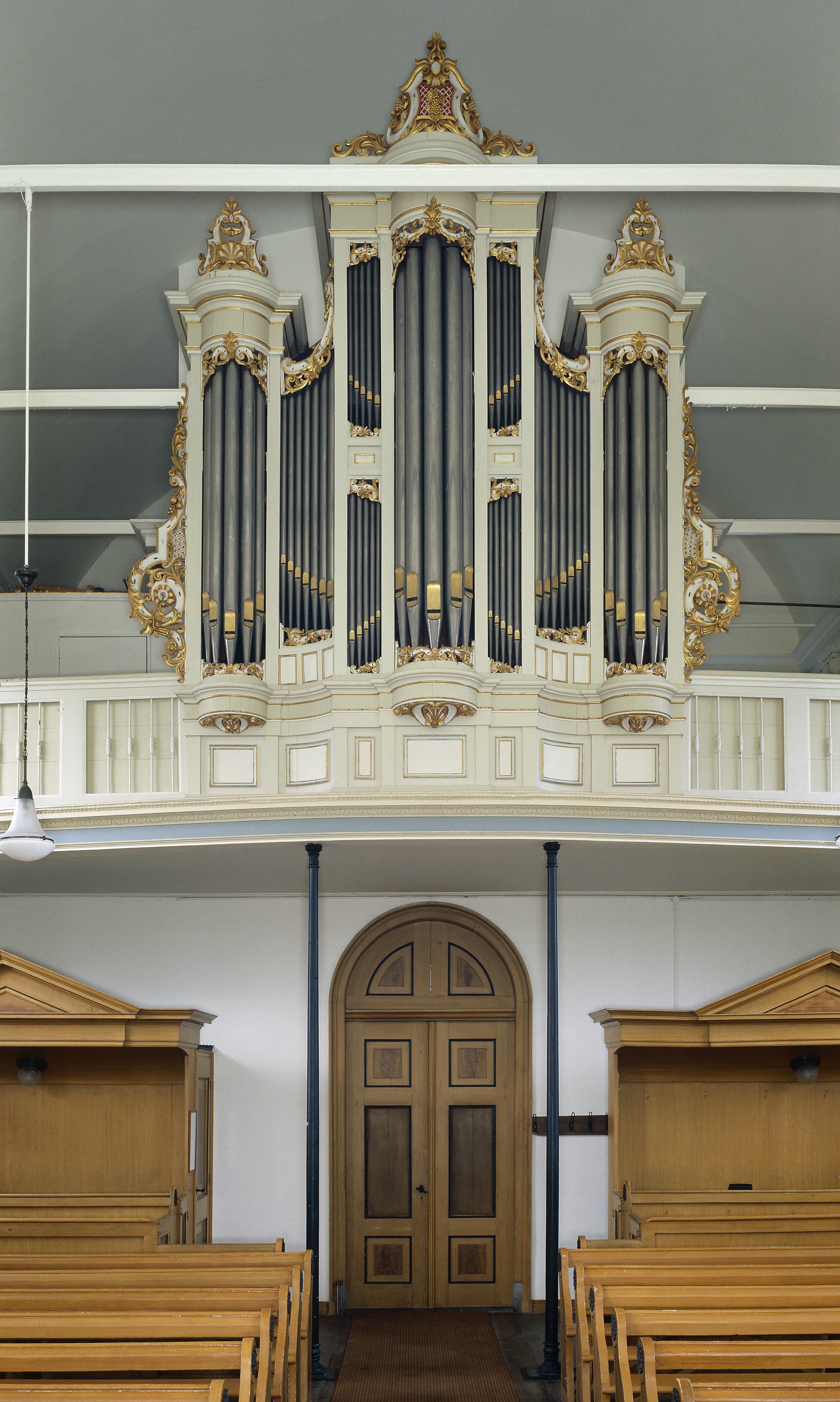 Nederlands Hervormde Kerk: Interieur, aanzicht orgel, orgelnummer 1451 (opmerking: Gefotografeerd voor Het Historische Orgel in Nederland 1878-1886, Bladzijde 44)